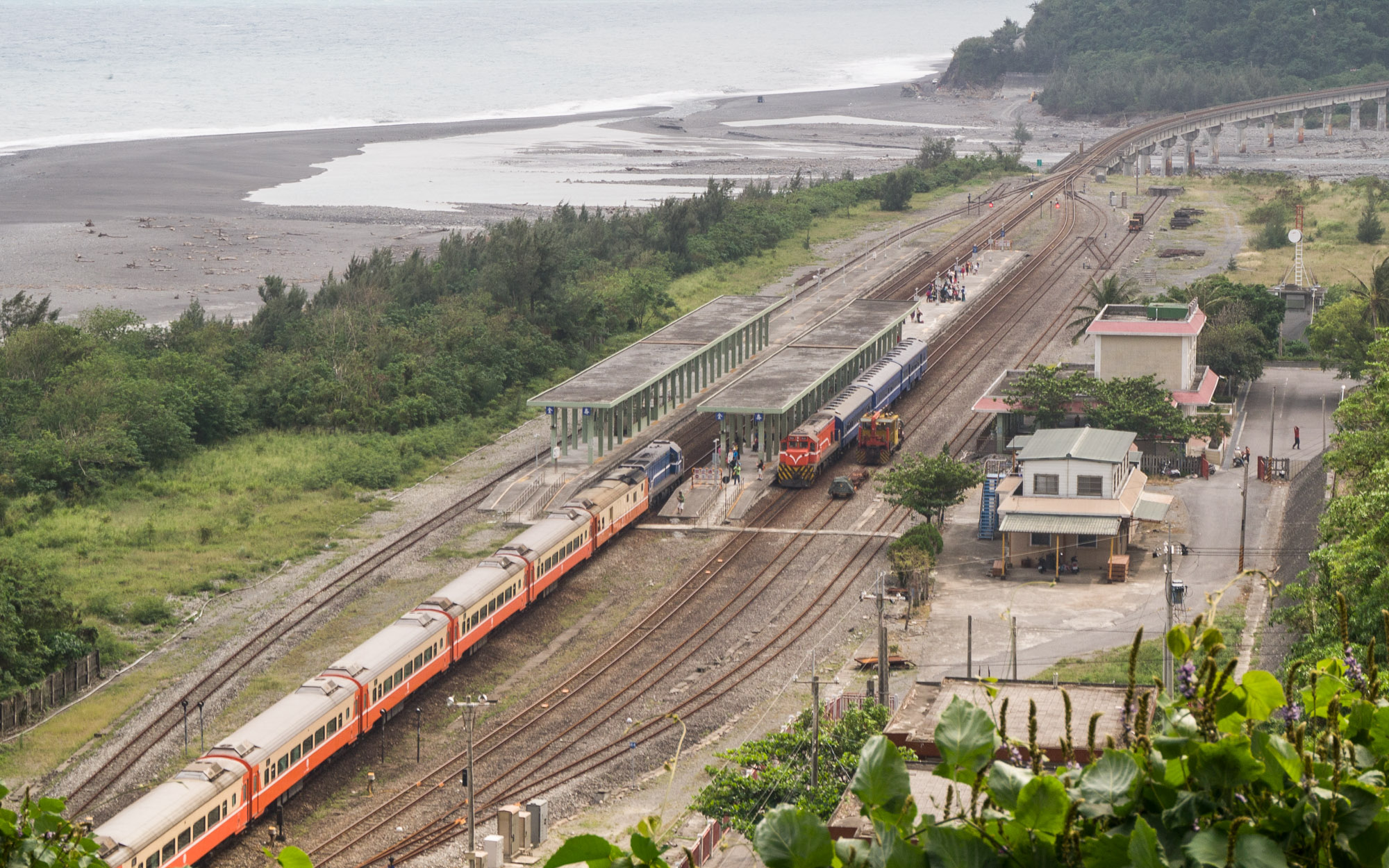 臺灣鐵路管理局金崙車站全景，第704車次莒光號與第3671車次普快車停靠本站。